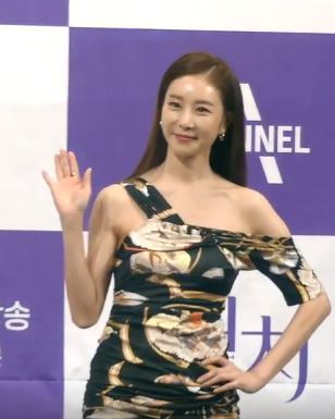 1월 3일 오후 서울시 강남구 논현동 임피리얼 팰리스 서울에서 채널A 새 금토드라마 '터치' 제작발표회가 열려 배우 주상욱 김보라 이태환 한다감 변정수가 참석해 포토타임을 갖고 있다.